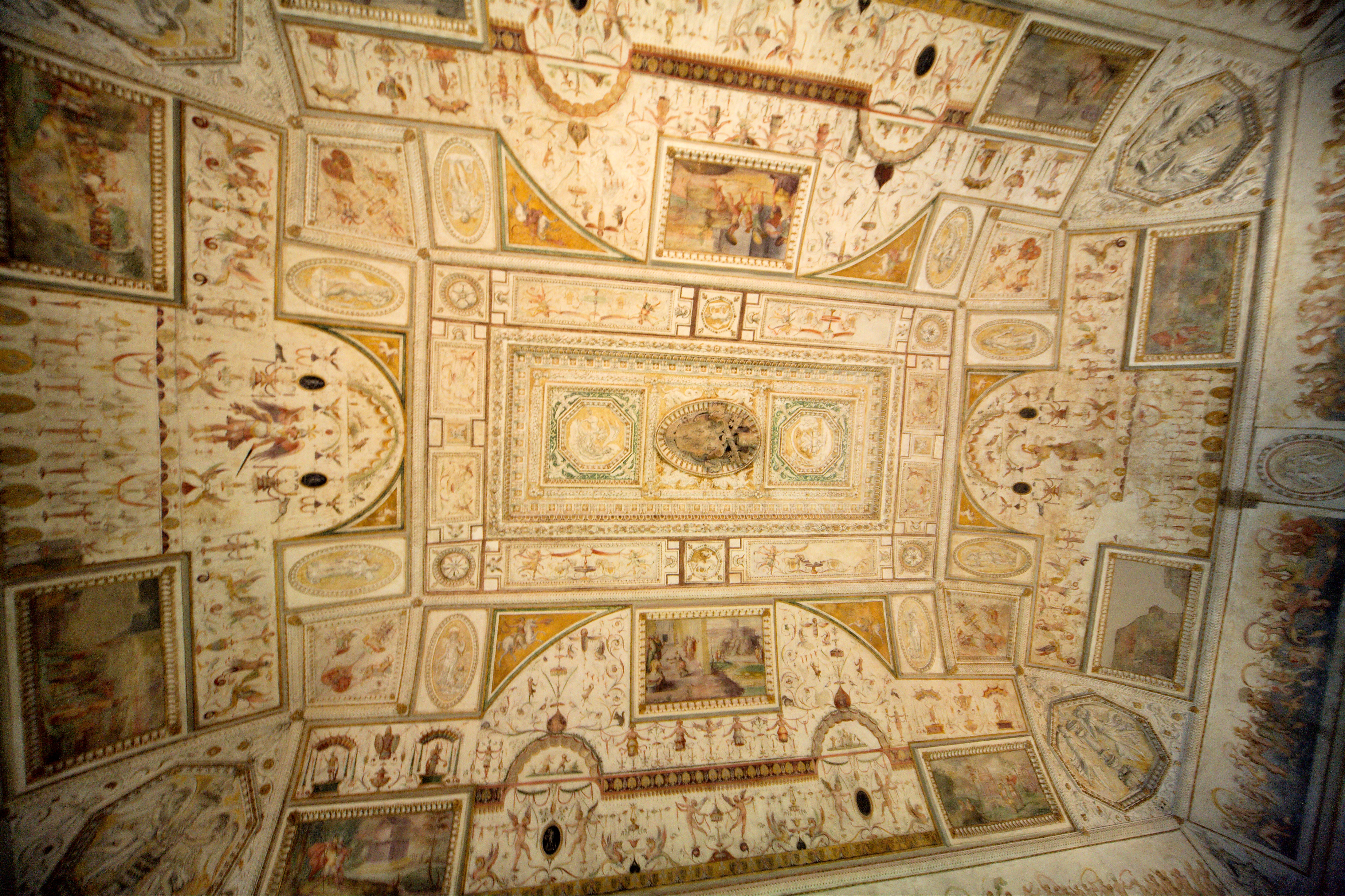 Der Bibliothekssaal der Engelsburg befindet sich ganz oben unter dem Dach